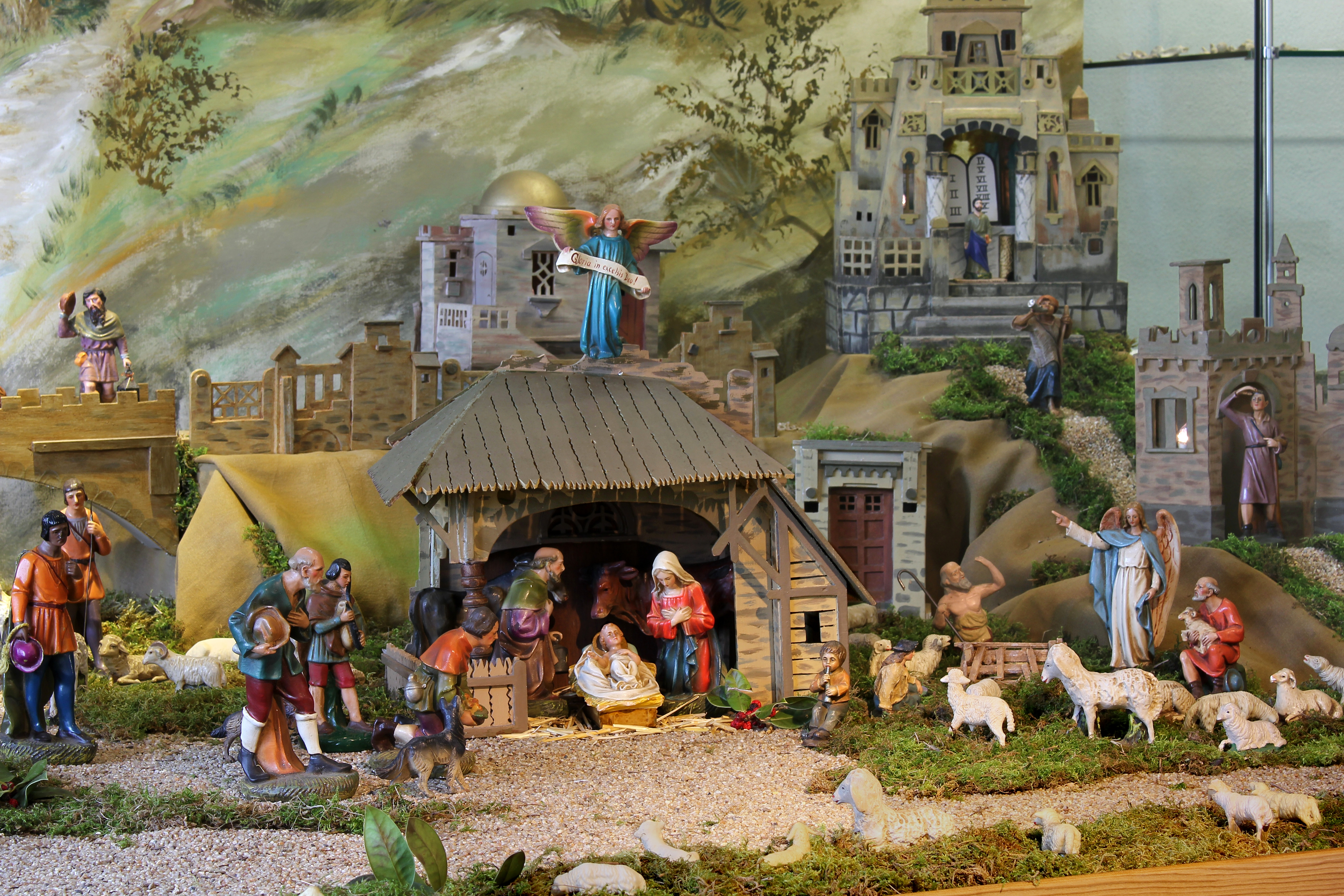 Weihnachtskrippe (Ausschnitt) der Familien Diewald, ausgestellt im Stadtmuseum Mülheim-Kärlich. Die Krippenlandschaft entwickelte sich seit den 1930er-Jahren über Jahrzehnte.